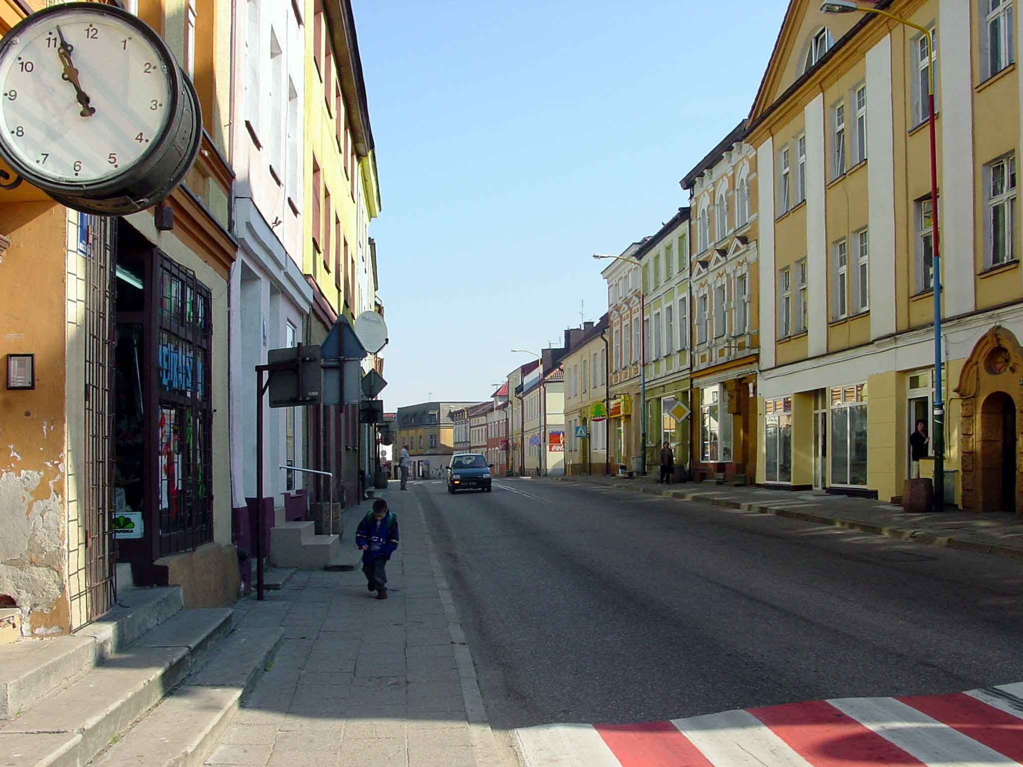 Karlino - Widok_na_ul._Koszalińską; autor zdjęcia Kluka; 02.02.2000r.